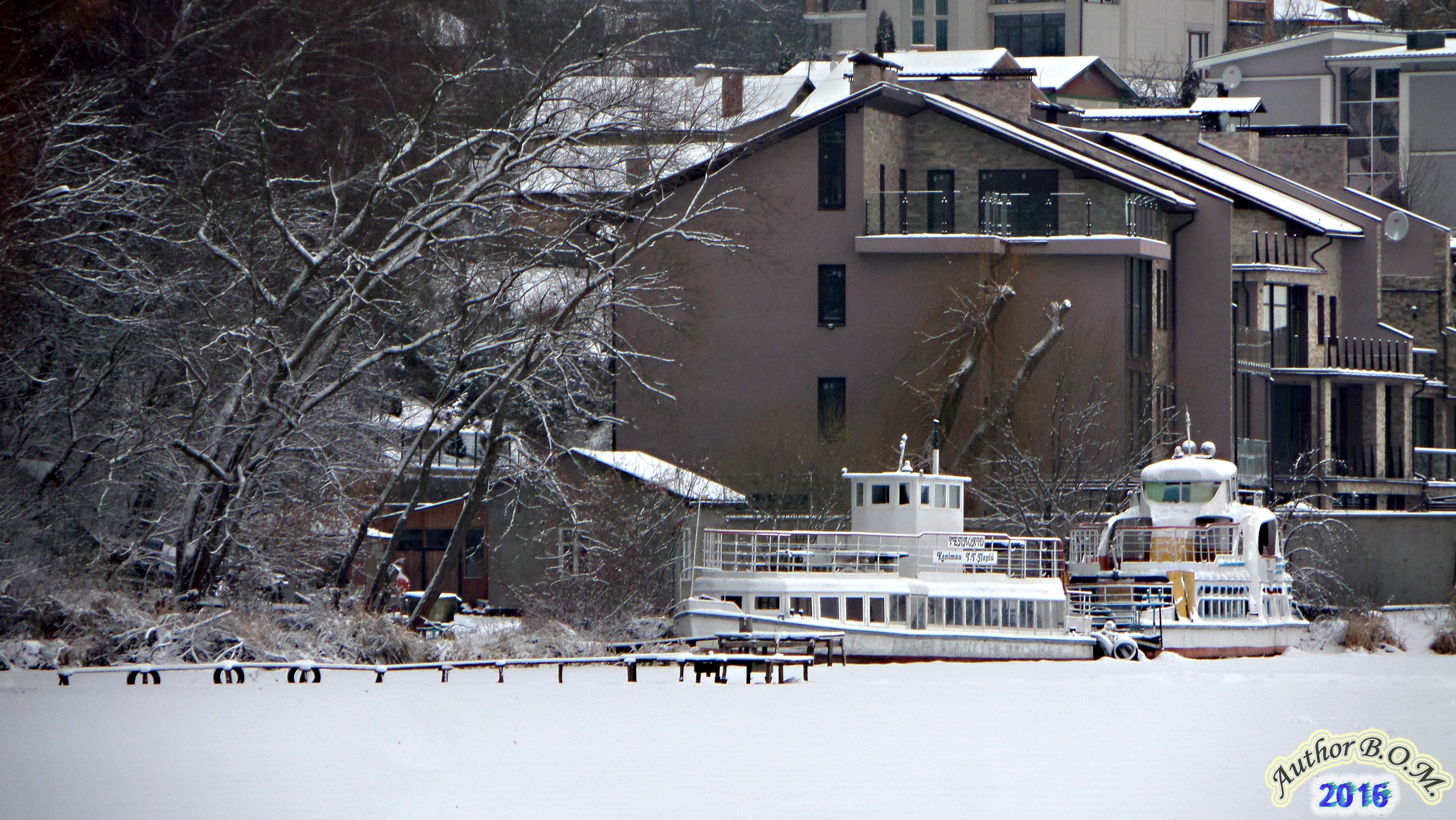 Теплоходи "Капітан Т.Г.Парій" та "Герой Танцоров" взимку на пристані у Кутківцях